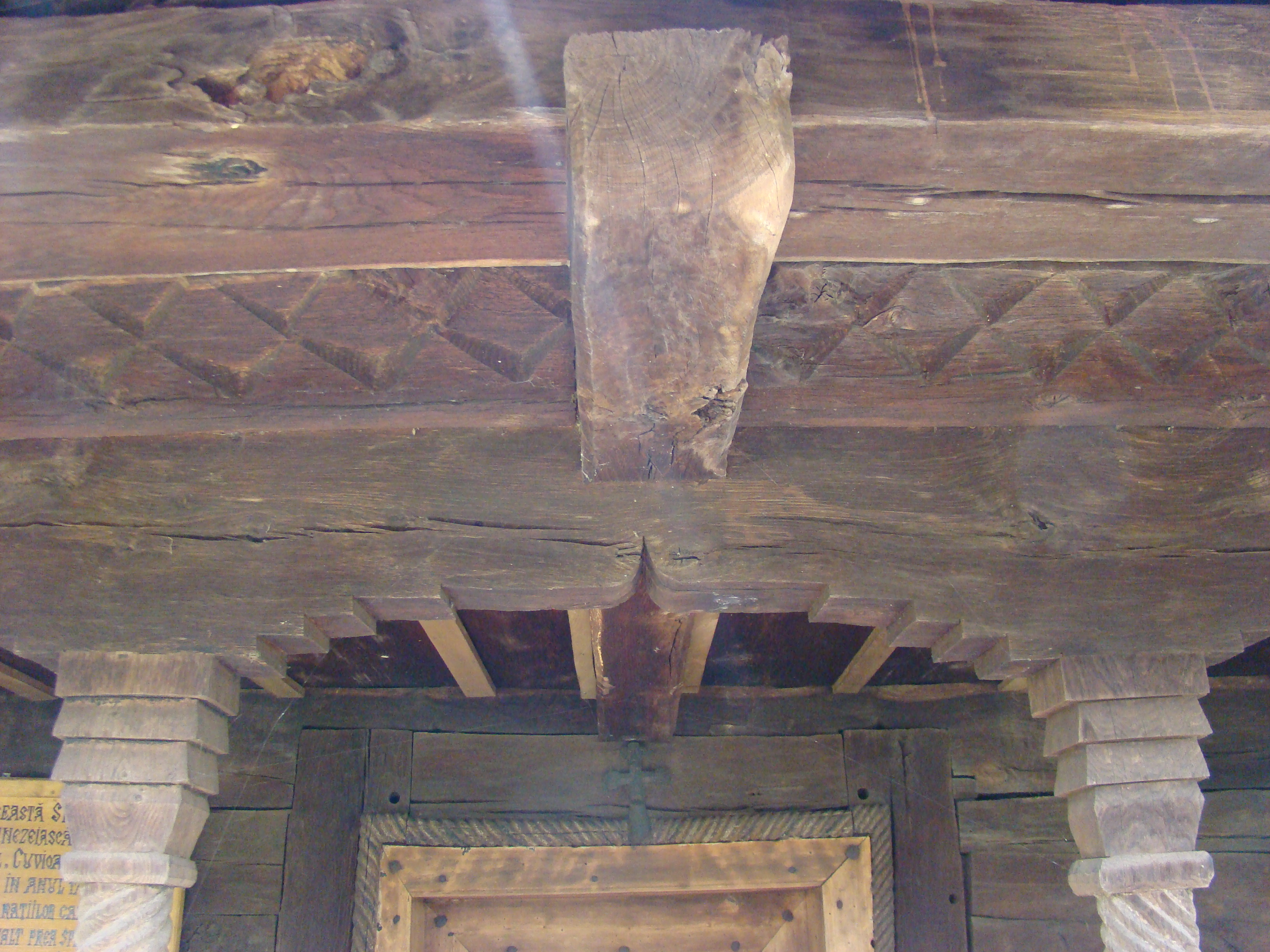 Biserica de lemn „Cuvioasa Paraschiva” din Peștișani, județul Gorj